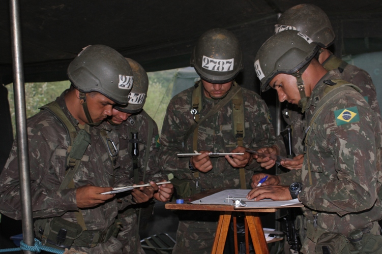 Topografia